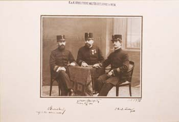 Three Military Rabbis, Vienna 28.3.1916